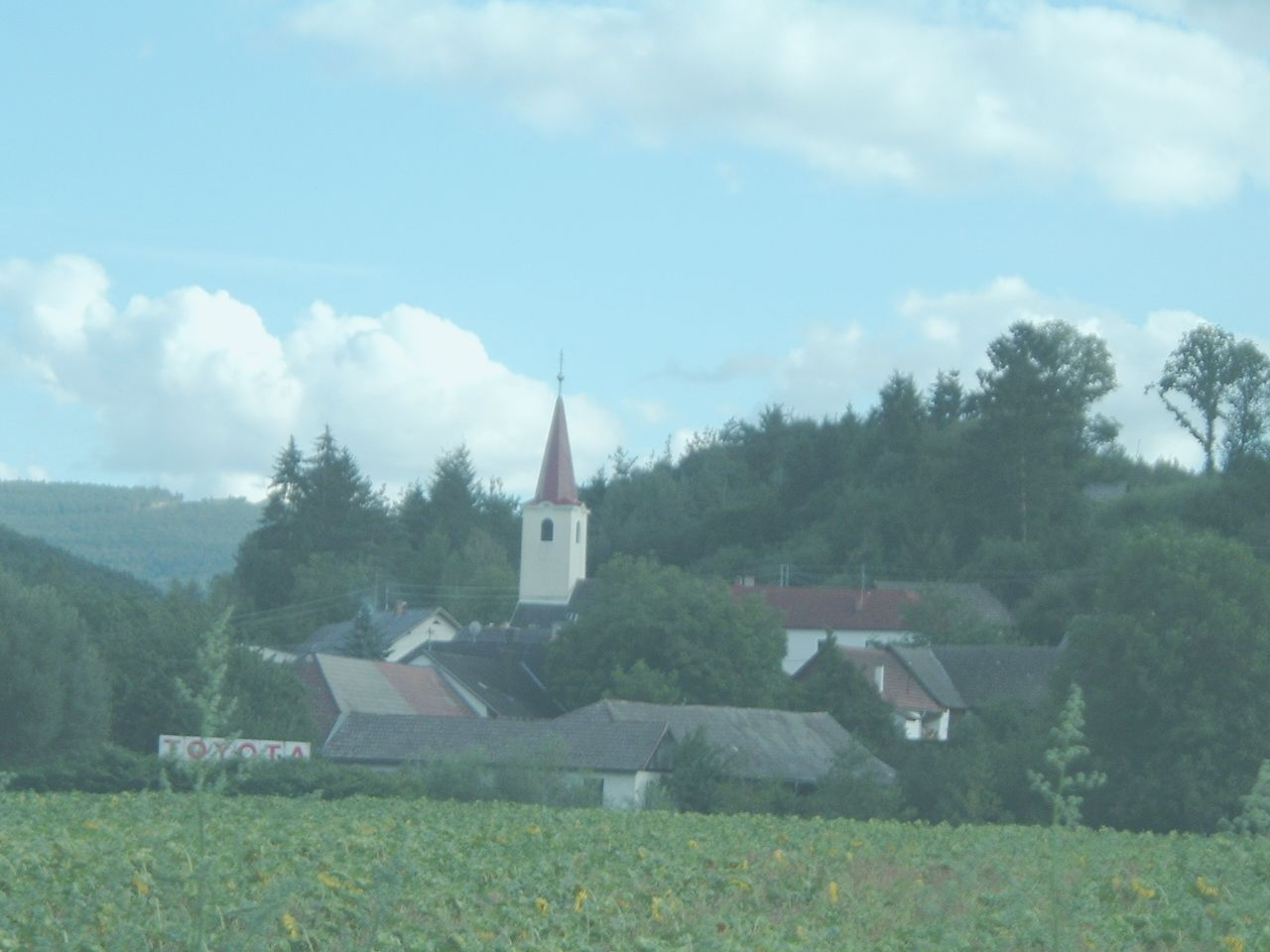 Hammerteich, Burgenland, Austria